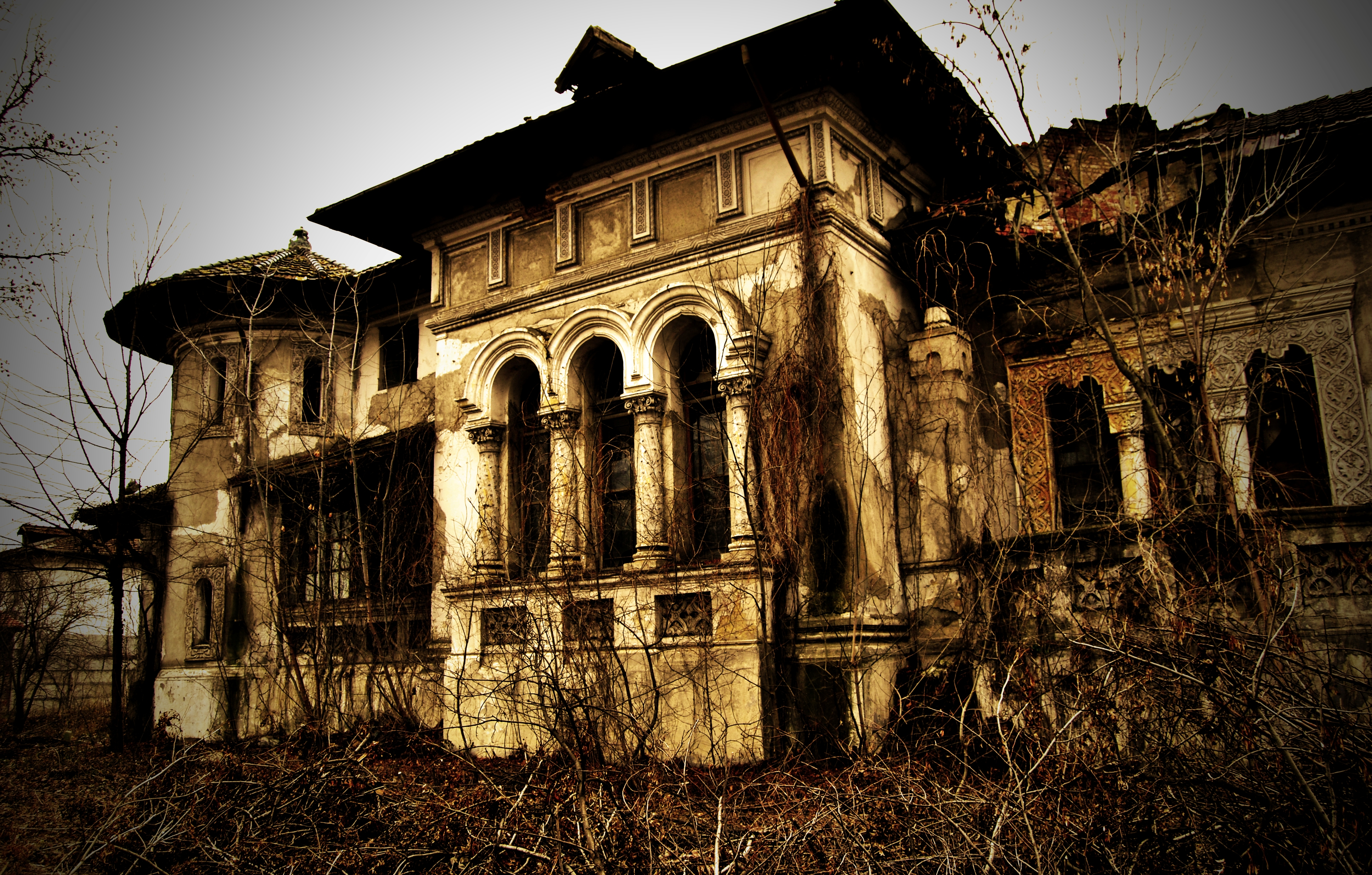 Pe bulevardul Kiseleff nr. 35-37 se află o curte năpădită de buruieni din care abia se ză­reş­te frumoasa casă, azi părăginită, ce i-a apar­ţinut, cândva, pictorului George Demetrescu Mirea. Construit în 1902, în stil neoromânesc, imobilul a fost vândut avocatului Jean Miclescu, nu înainte ca artistul să-i decoreze tavanul cu splendide picturi. Acum e în posesia lui Ţiţi Dumitriu, fost antrenor Steaua care o lasă în paragină.